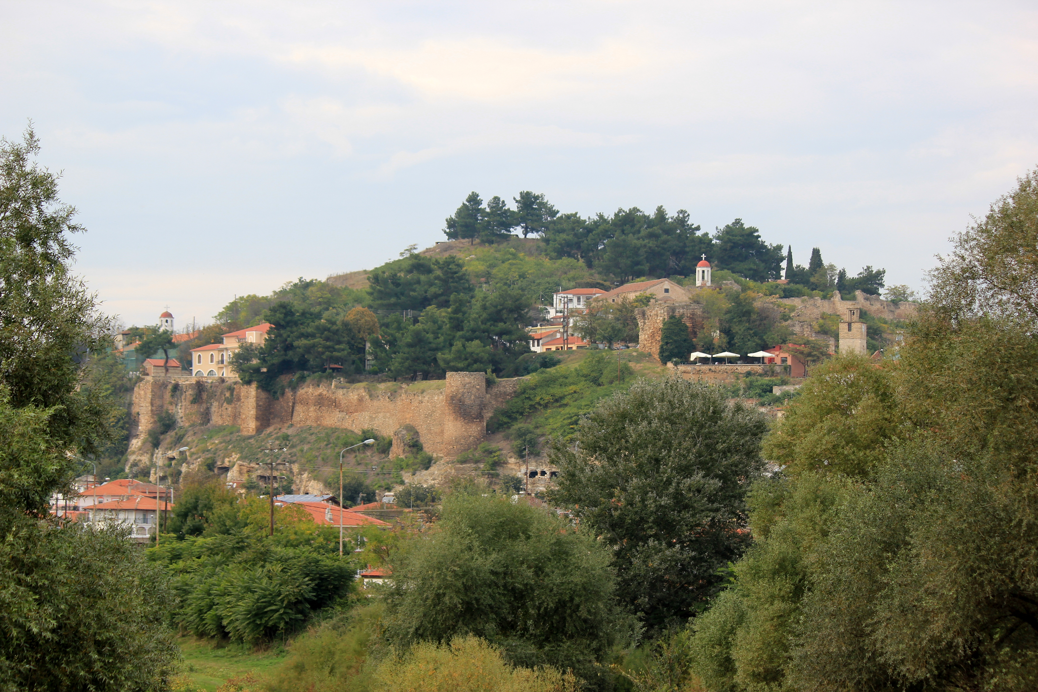 Burgberg in Didymoticho, Griechenland.